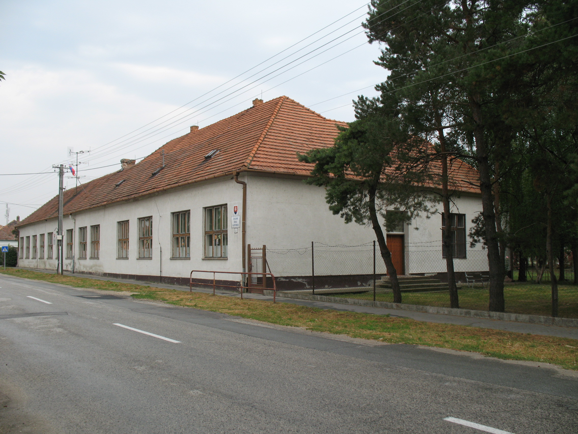 Kajal iskola